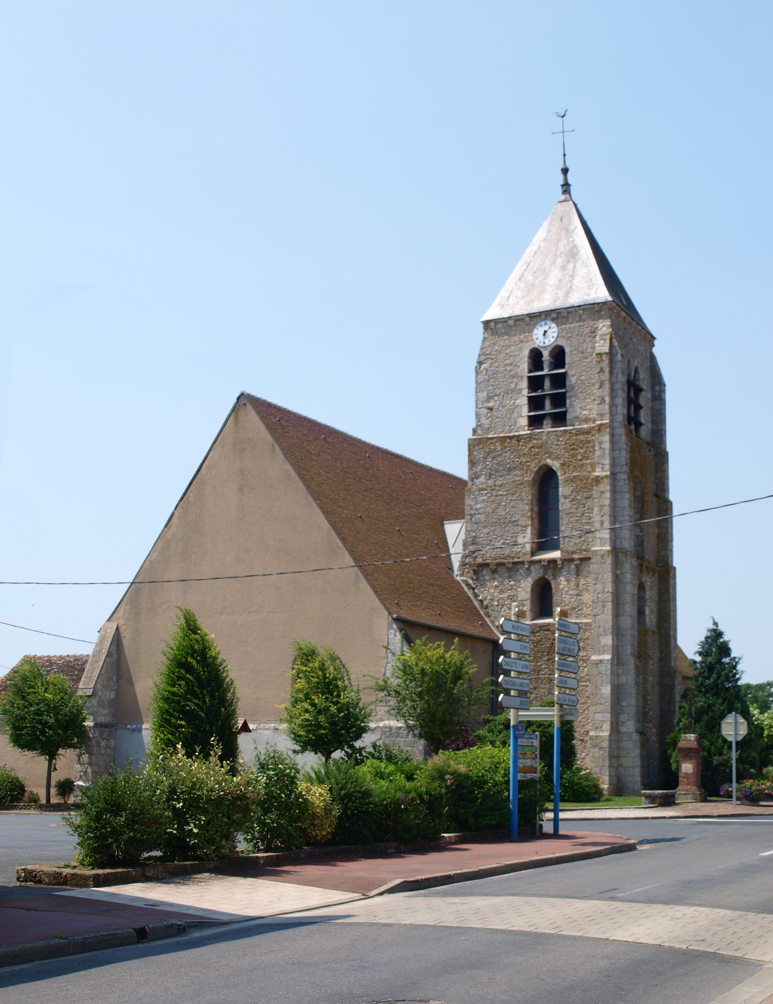 Corquilleroy (Loiret, France) ; le bourg : l'église